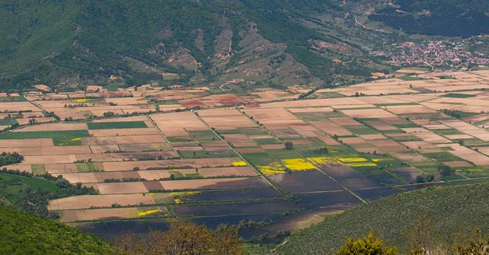 Елеското поле и временното езеро при Елеските дупки, снимани от Щудер